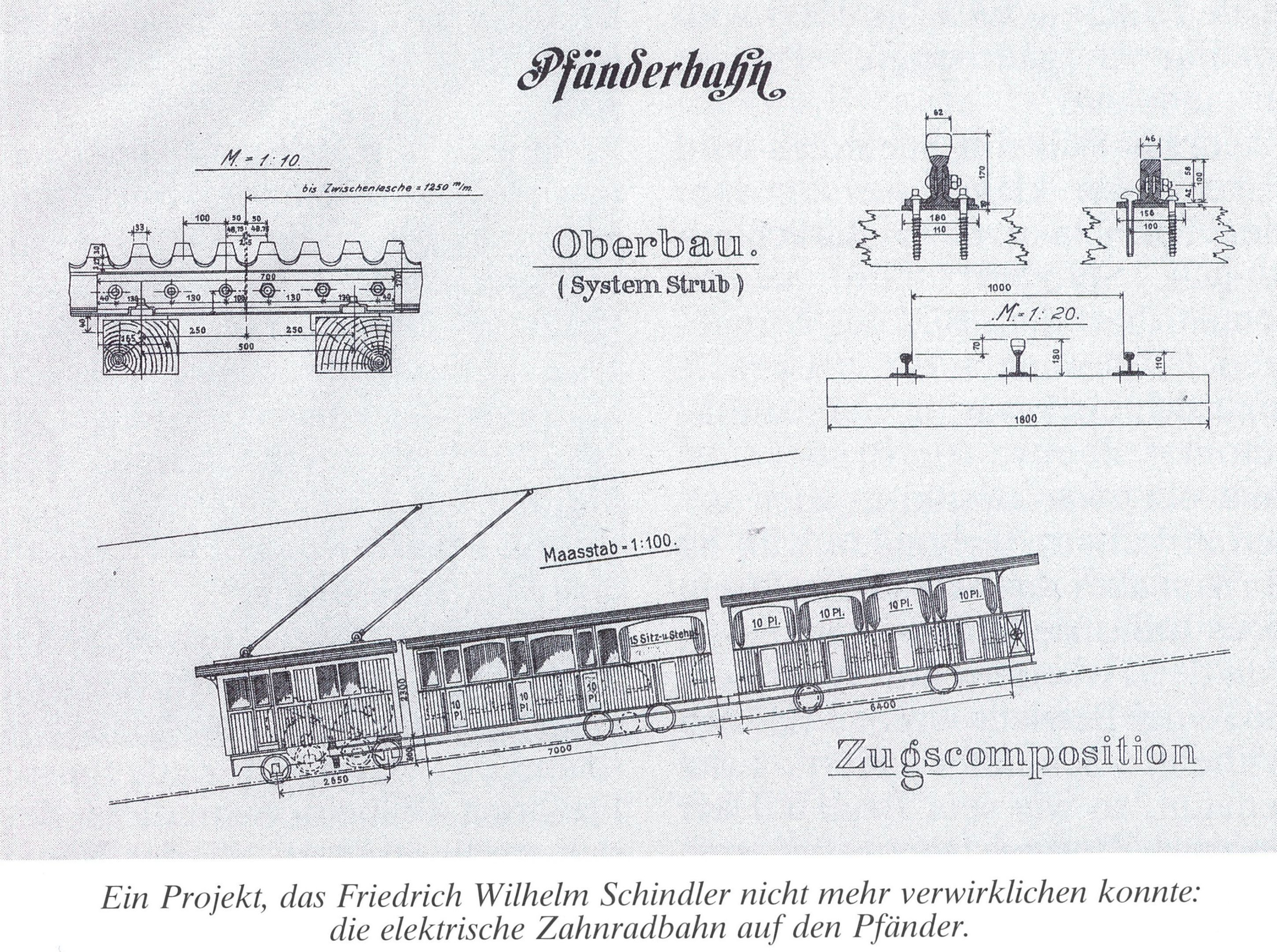 Friedrich Wilhelm Schindler geboren am 1. Juni 1856 in Mollis, Schweiz; gestorben am 19. November 1920 in Kennelbach, Österreich) war ein österreichischer Unternehmer und Erfinder. Außerdem war er der Neffe von Dietrich Schindler. Das Projekt Pfänderbahn konnte von ihm nicht mehr realisiert werden.